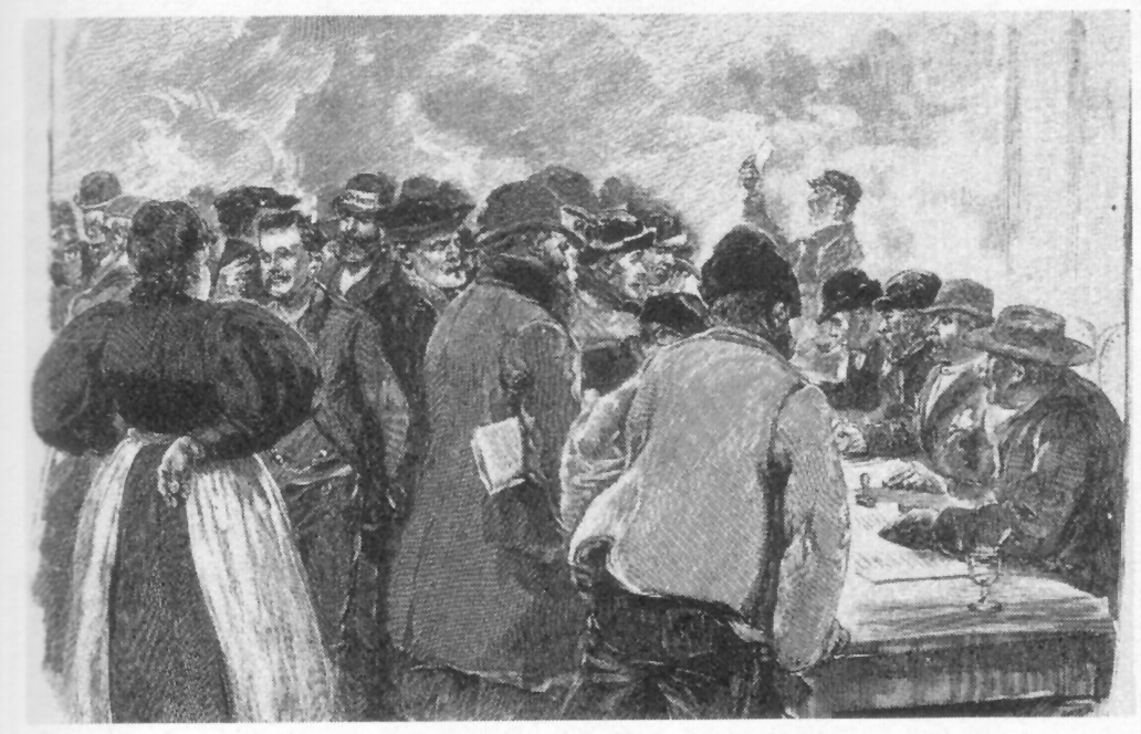 Hamburger Hafenarbeiterstreik 1896/97, Abstempeln der Streikkarten, Holzstich von Emil Limmer // Hamburg Docker’s Strike 1896/97, stamping of strike cards, xylograph of Emil Limmer